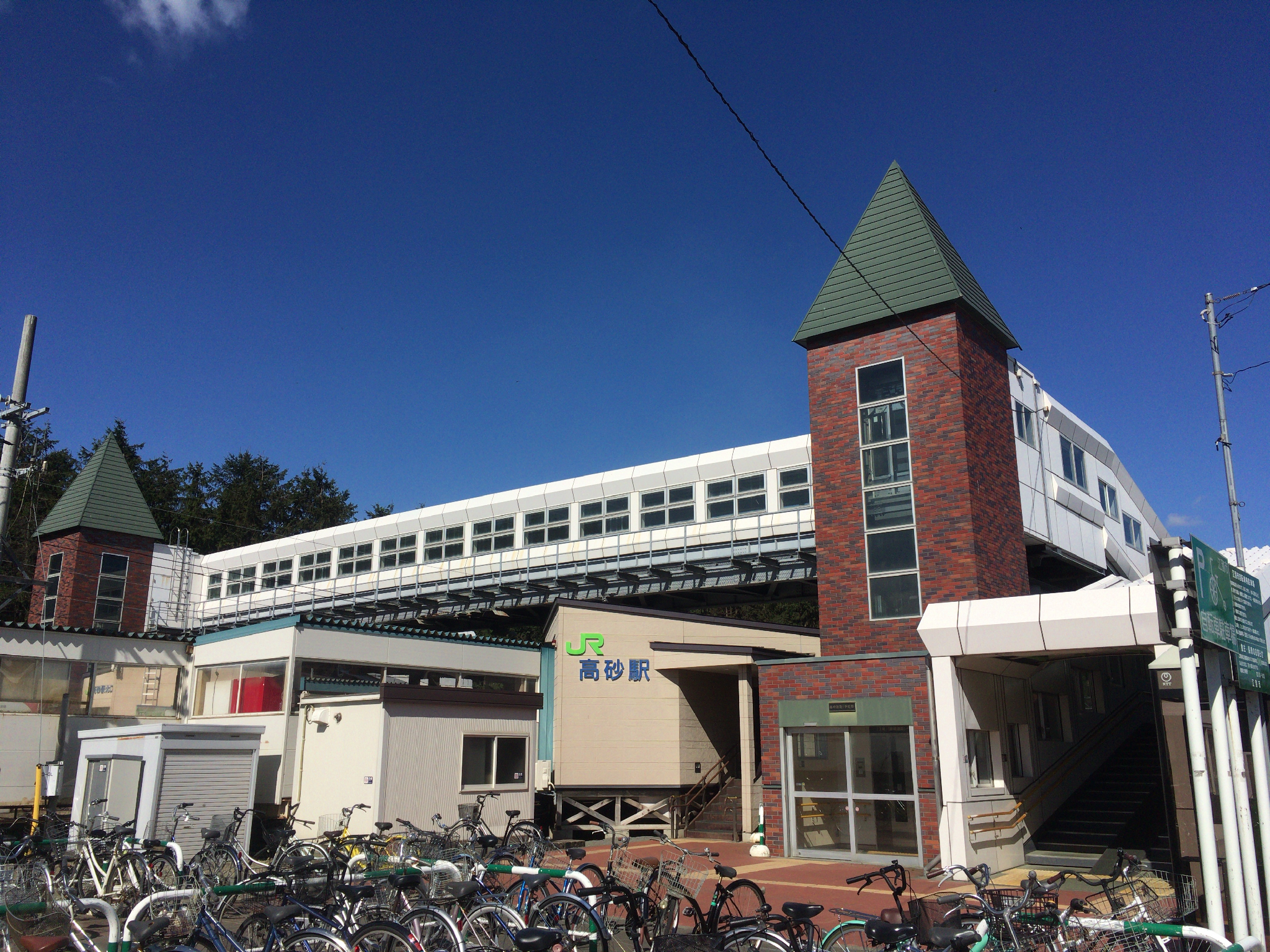 JR高砂駅 駅舎